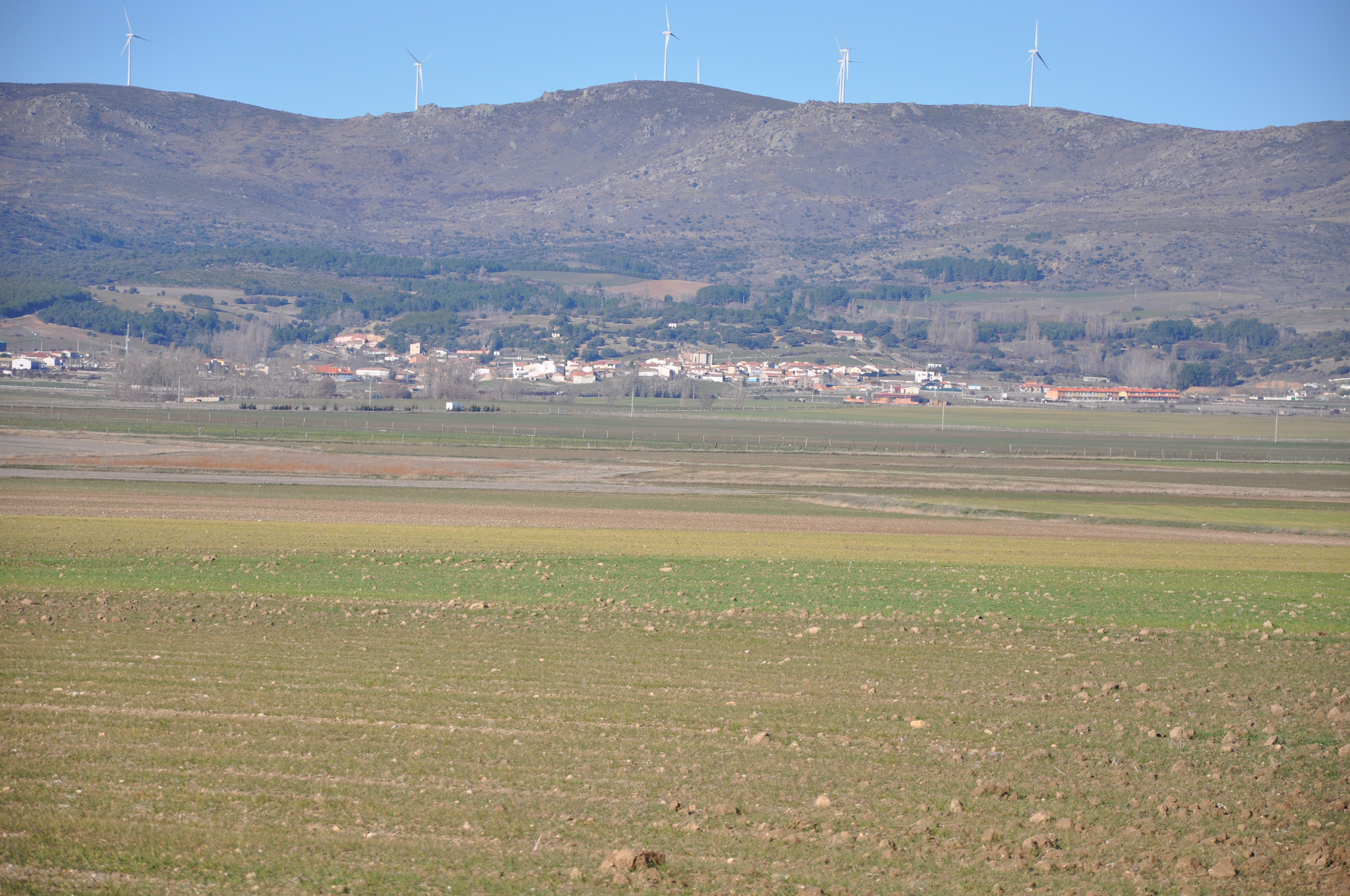 Muñana, Ávila, España.